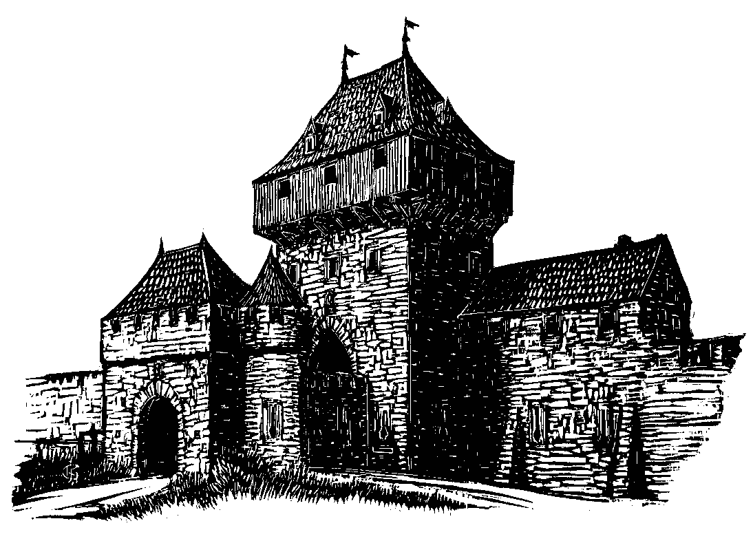 Rosstor, Aachen